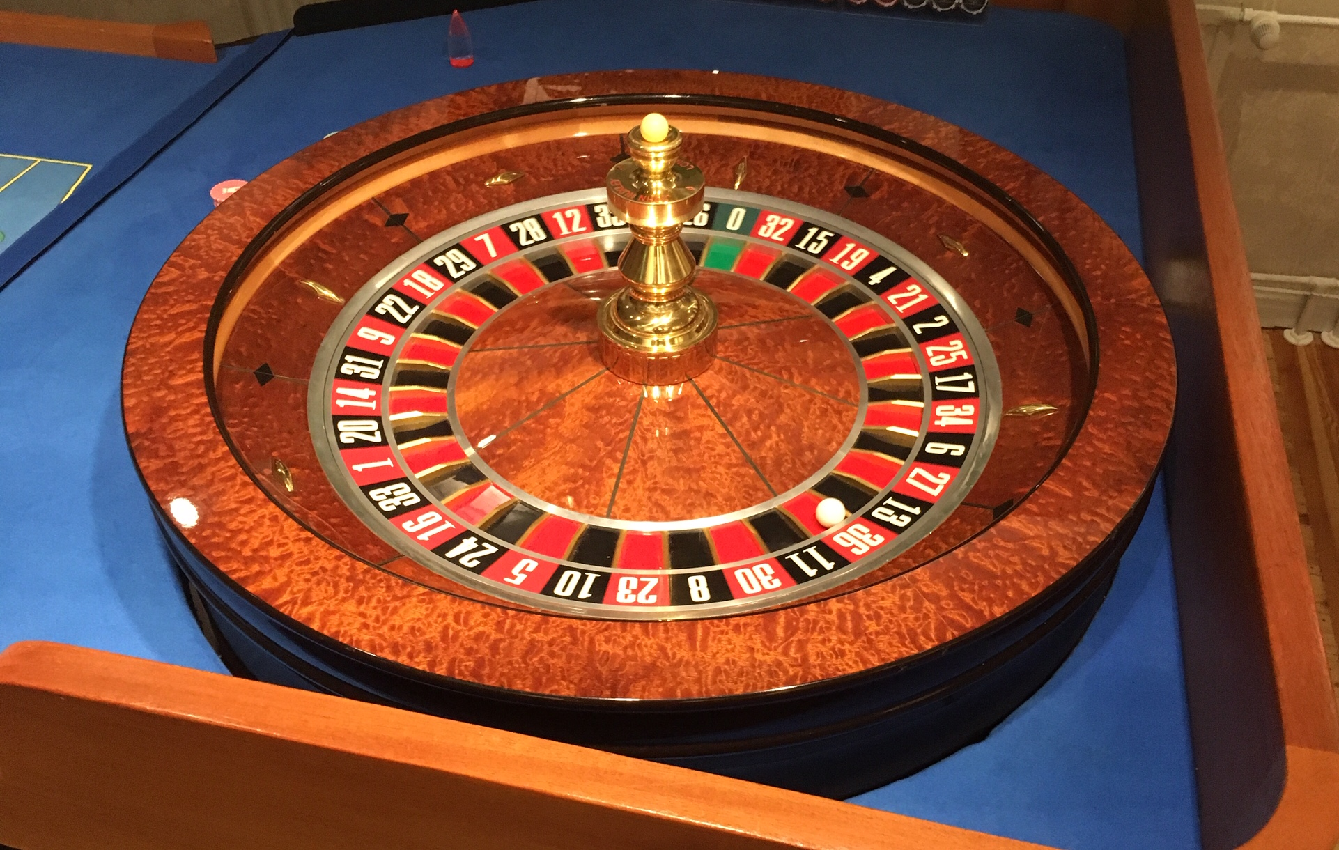 Täysikokoinen 32" rulettikehä eli rulettipyörä.